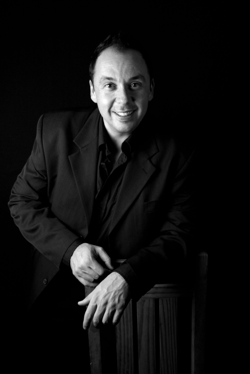 Rundfunkmoderator in Frankfurt